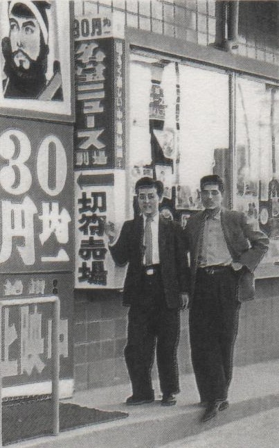 名古屋市中区栄の名宝会館にあった名宝ニュース劇場。